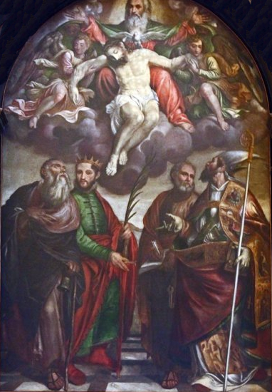 Pala d'altare presso la chiesa di santa Eufemia a Verona, opera di Jacopo Ligozzi, la Santissima Trinità. 1577 circa.